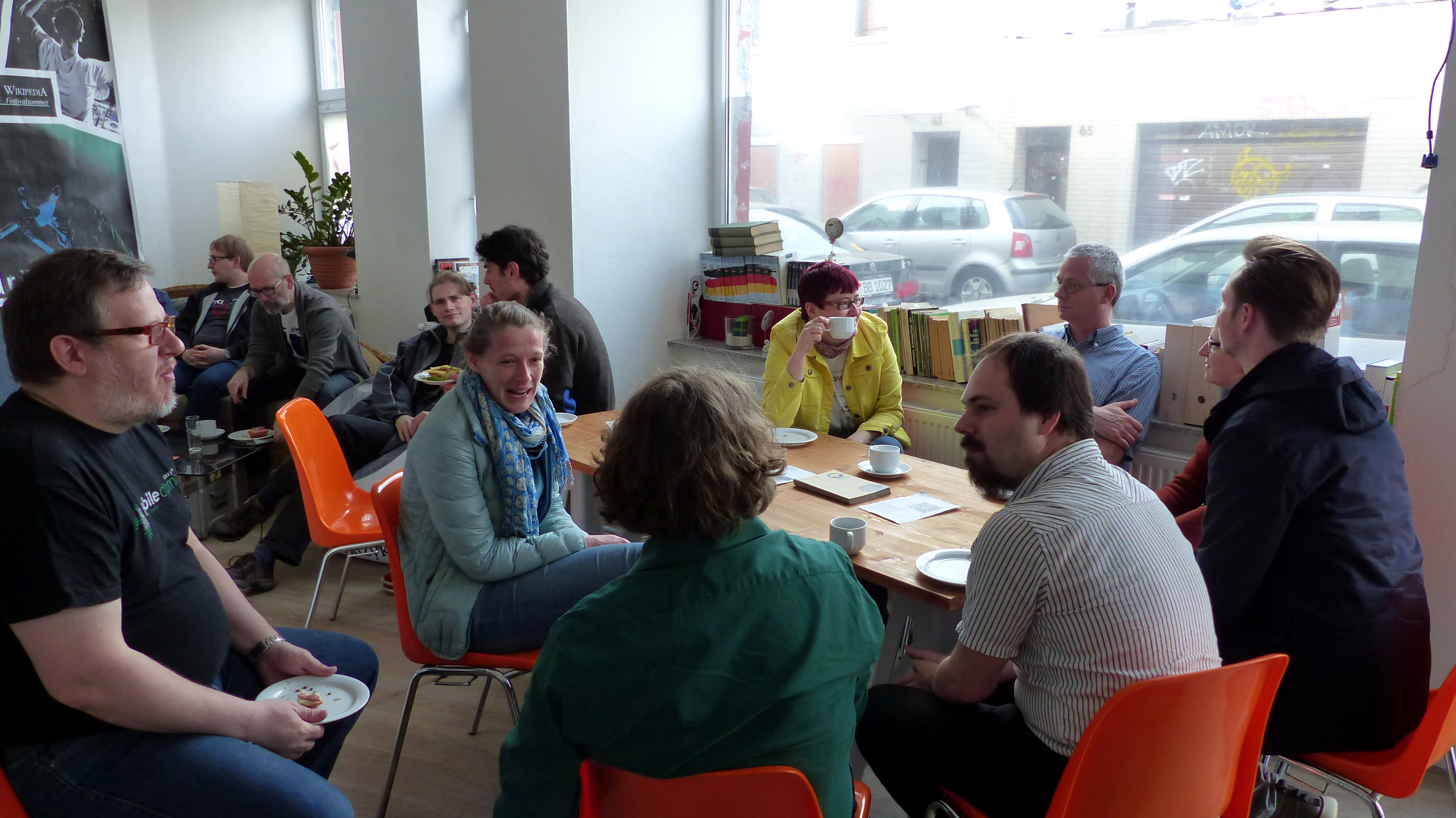 Nachprogramm zur 16. MV des WMDE - Gemeinsames Frühstück im Lokal K in Köln am 19. April 2015